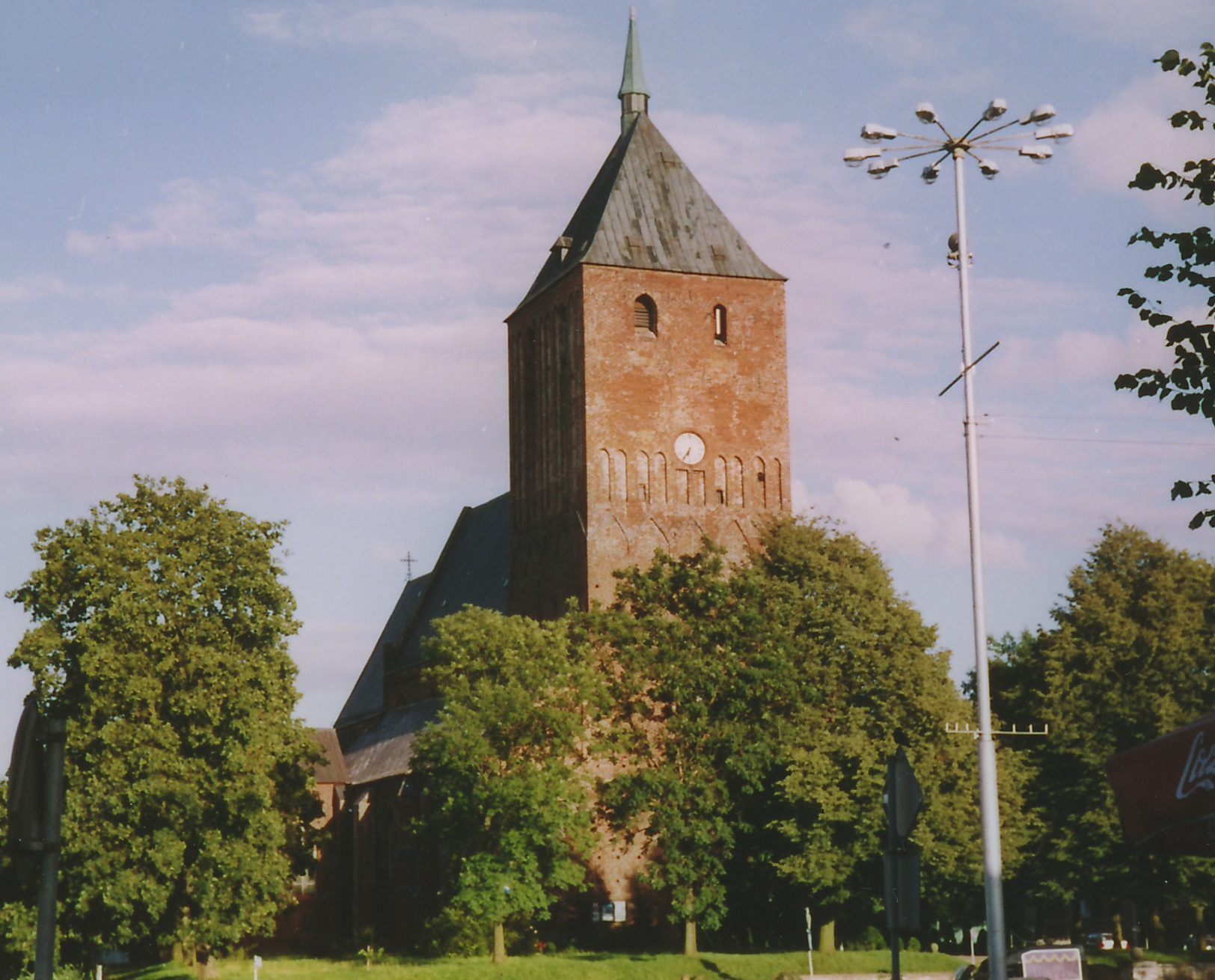 Sławno, kościół NMP